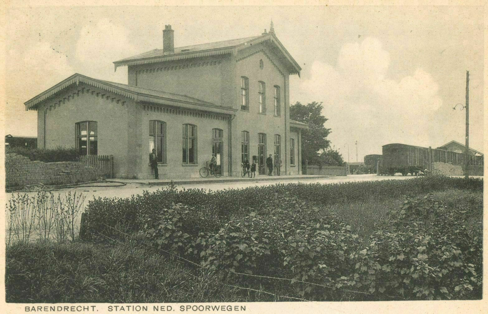 Gezicht op het N.S.-station Barendrecht te Barendrecht.